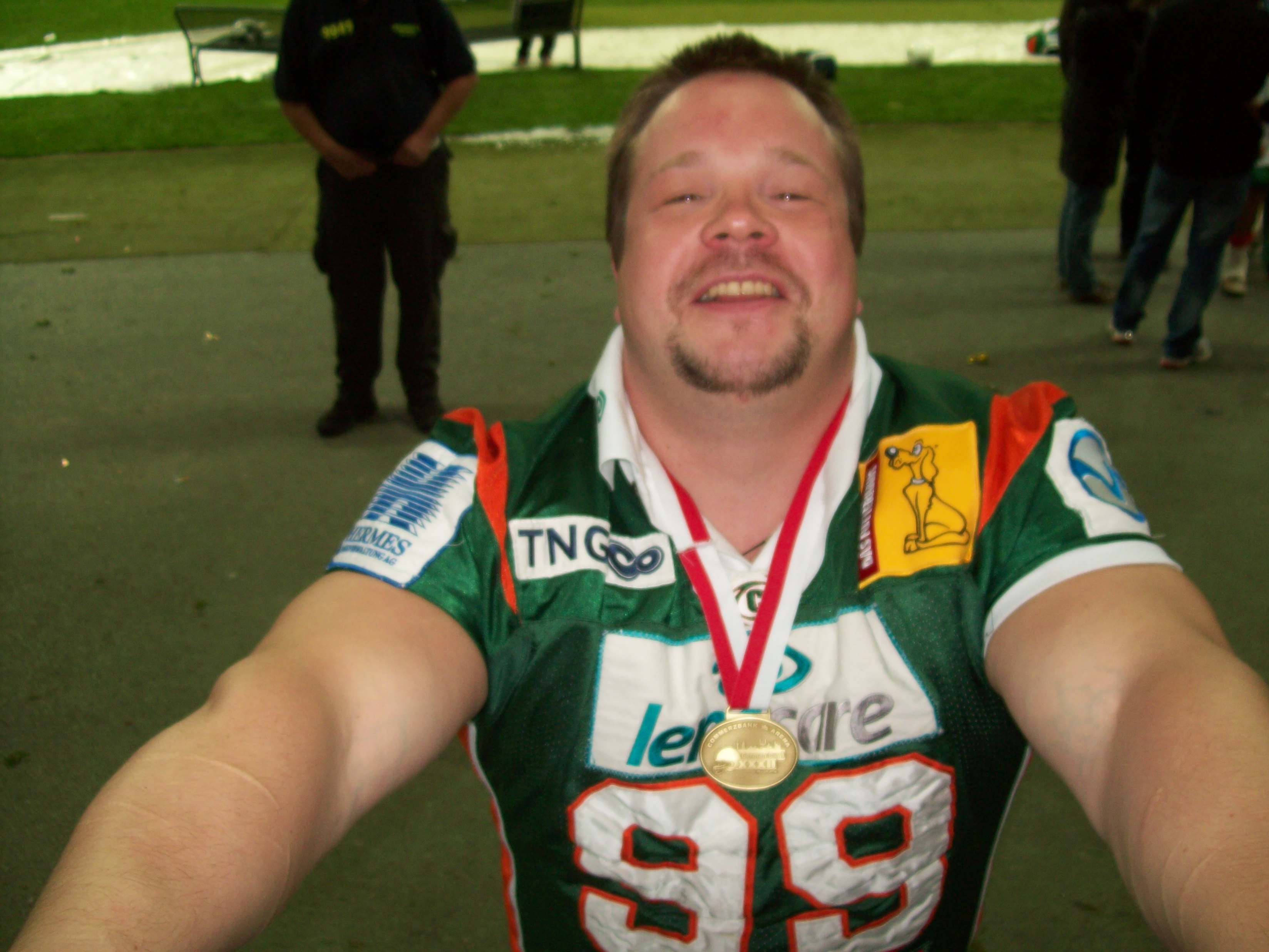 Алексей после награждения c медалью чемпиона GFL Комерцбанк Арена Франкфурт на Майне 2010 год.